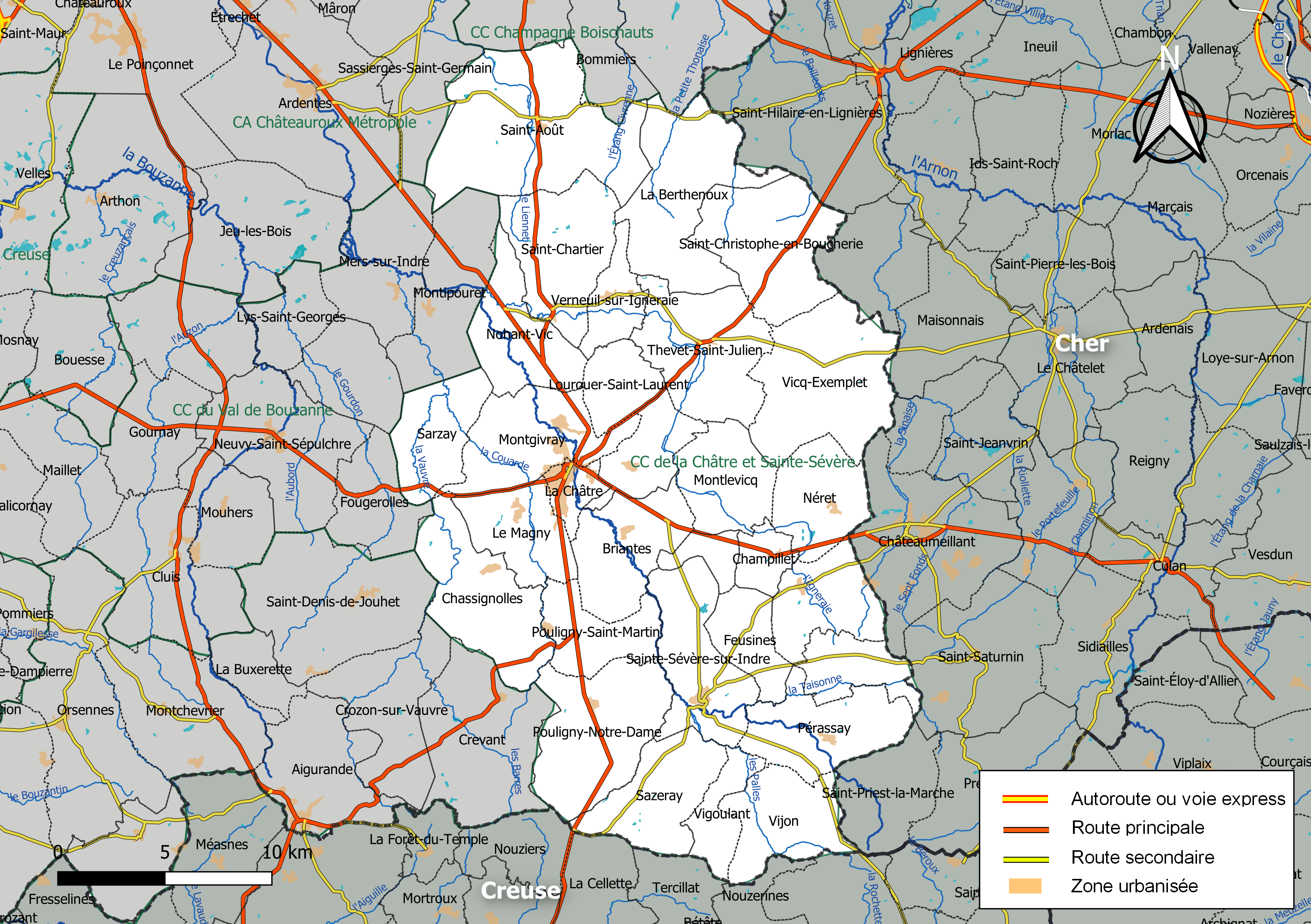 Carte de la communauté de communes de La Châtre et Sainte-Sévère, département de l'Indre, France. Composition au 1er janvier 2019.